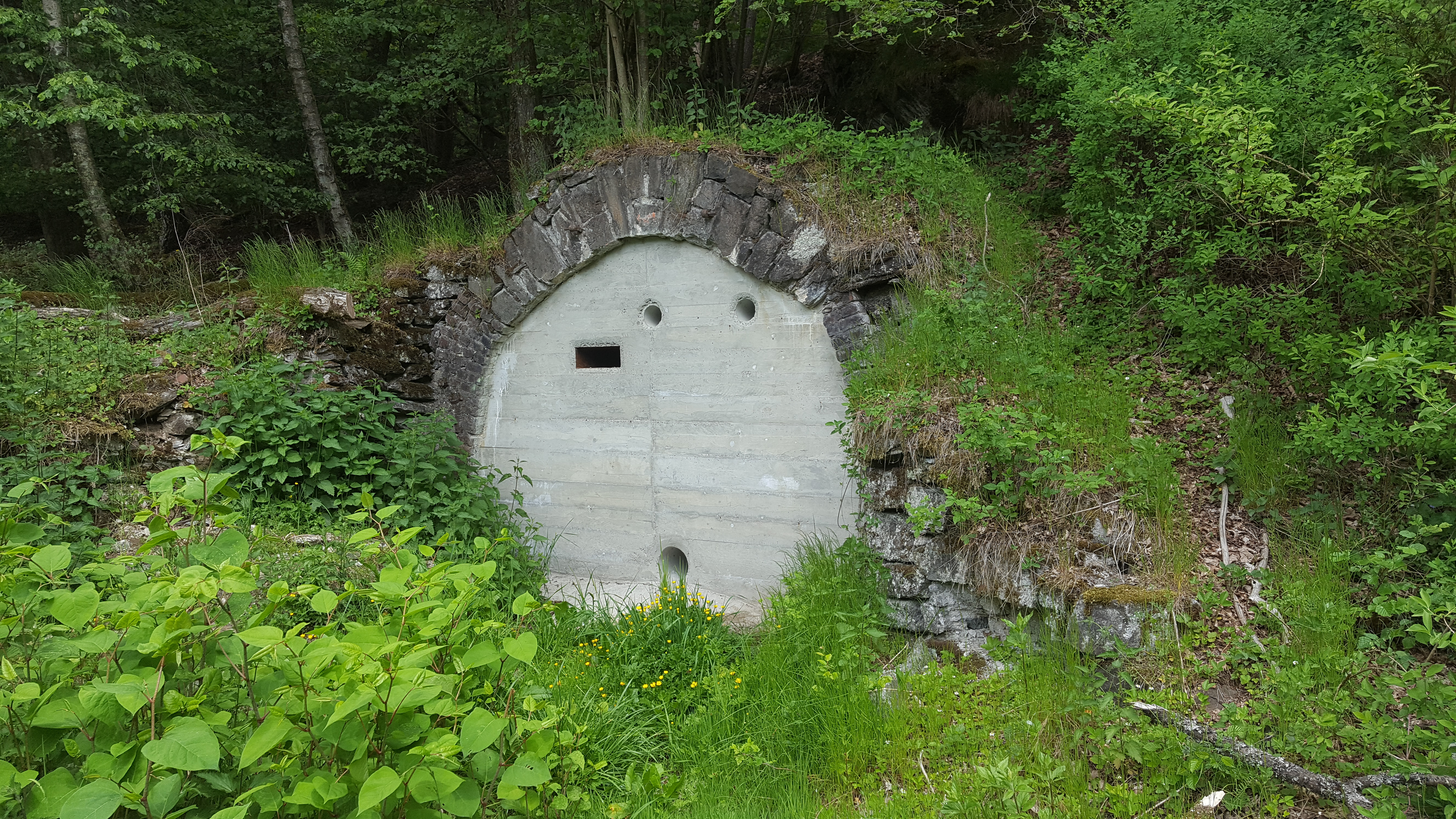 Theresienstollen der Grube Ameise im oberen Leimbachtal bei Siegen